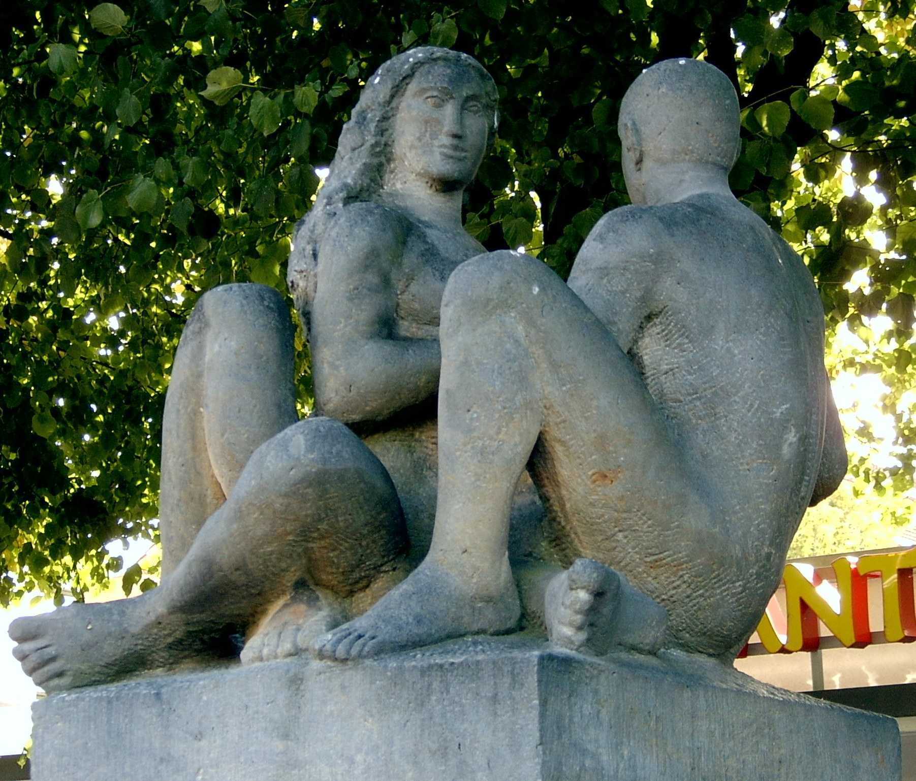 Brunnen auf der Magistrale in Frankfurt (Oder)